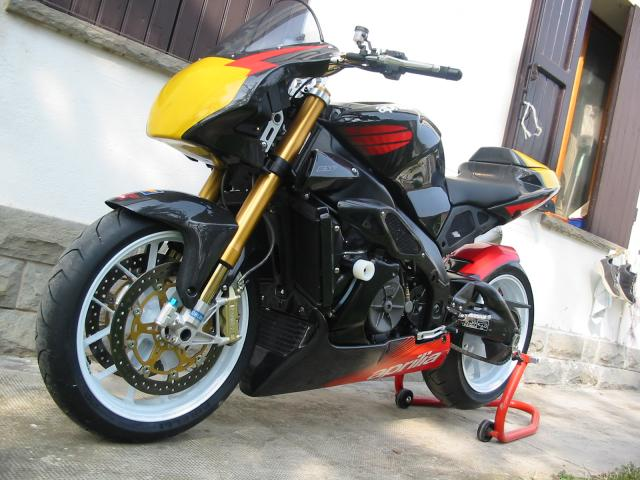 Fabbri Flavio Macchina fotografica Aprilia Tuono Mille Racing Licenza libera